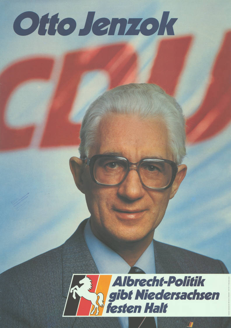 Otto Jenzok CDU Albrecht-Politik gibt Niedersachsen festen Halt Abbildung: Porträtfoto - Nationalfarben mit Niedersachsenross Kommentar: Mit Stempelaufdruck des Kreisverbandes Delmenhorst auf der Frontseite. Plakatart: Kandidaten-/Personenplakat mit Porträt Auftraggeber: Verantw.: Niedersachsen-CDU, Hannover Drucker_Druckart_Druckort: Willy F.P. Fehling GmbH, Hannover Objekt-Signatur: 10-008 : 485 Bestand: Landtagswahlplakate Niedersachsen (10-008) GliederungBestand10-18: Landtagswahlplakate Niedersachsen (10-008) » CDU Lizenz: KAS/ACDP 10-008 : 485 CC-BY-SA 3.0 DE